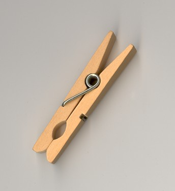 Wäscheklammer, Holz, frühe 2000er